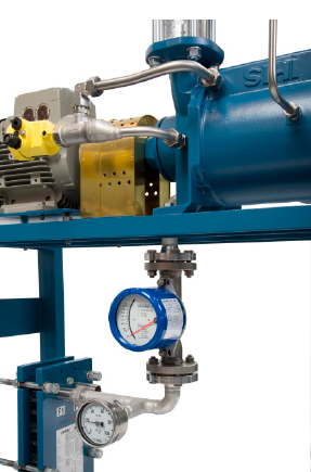 Металлический ротаметр в работе